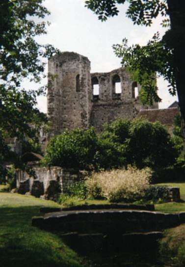 La Tour de Ganne à Grez-sur-Loing, juillet 2003